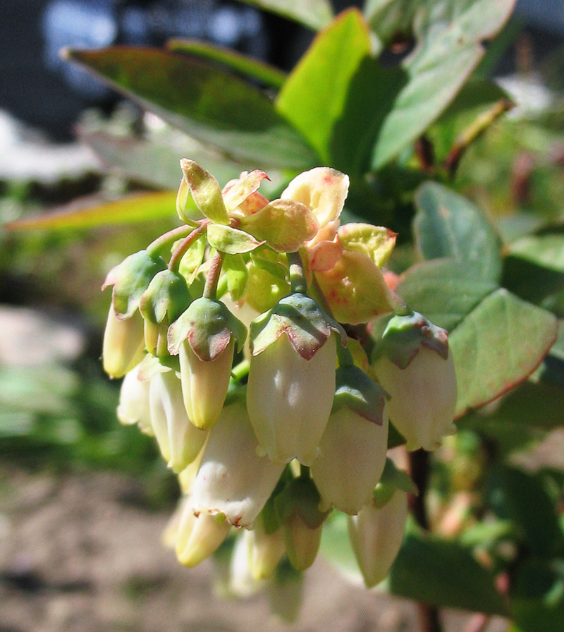 Beschreibung: Amerikanische Heidelbeere (Vaccinium corymbosum) Fotograf: Darkone, 26. Mai 2005